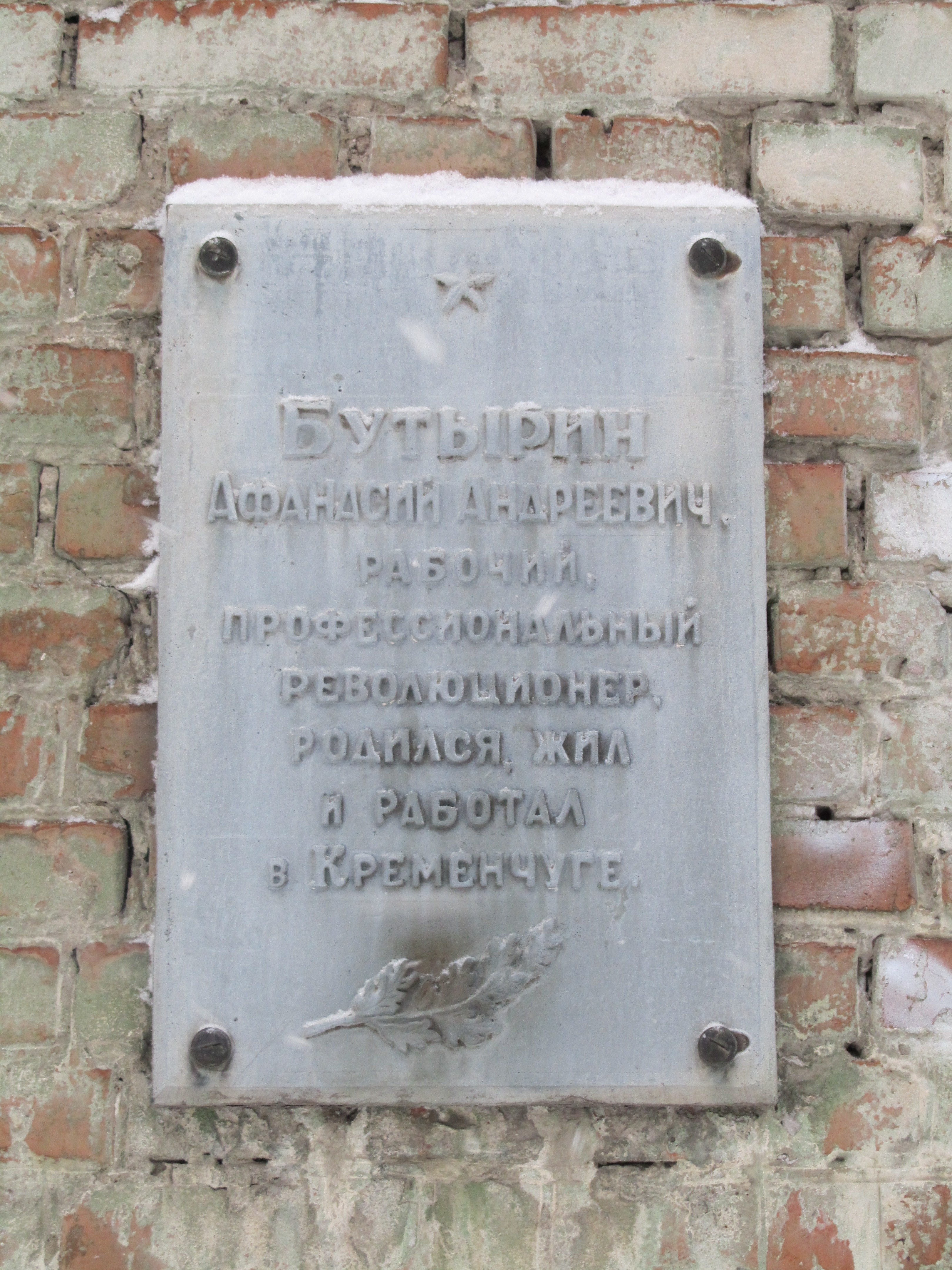 Анотаційна дошка Бутиріну Афанасію Андрійовичу